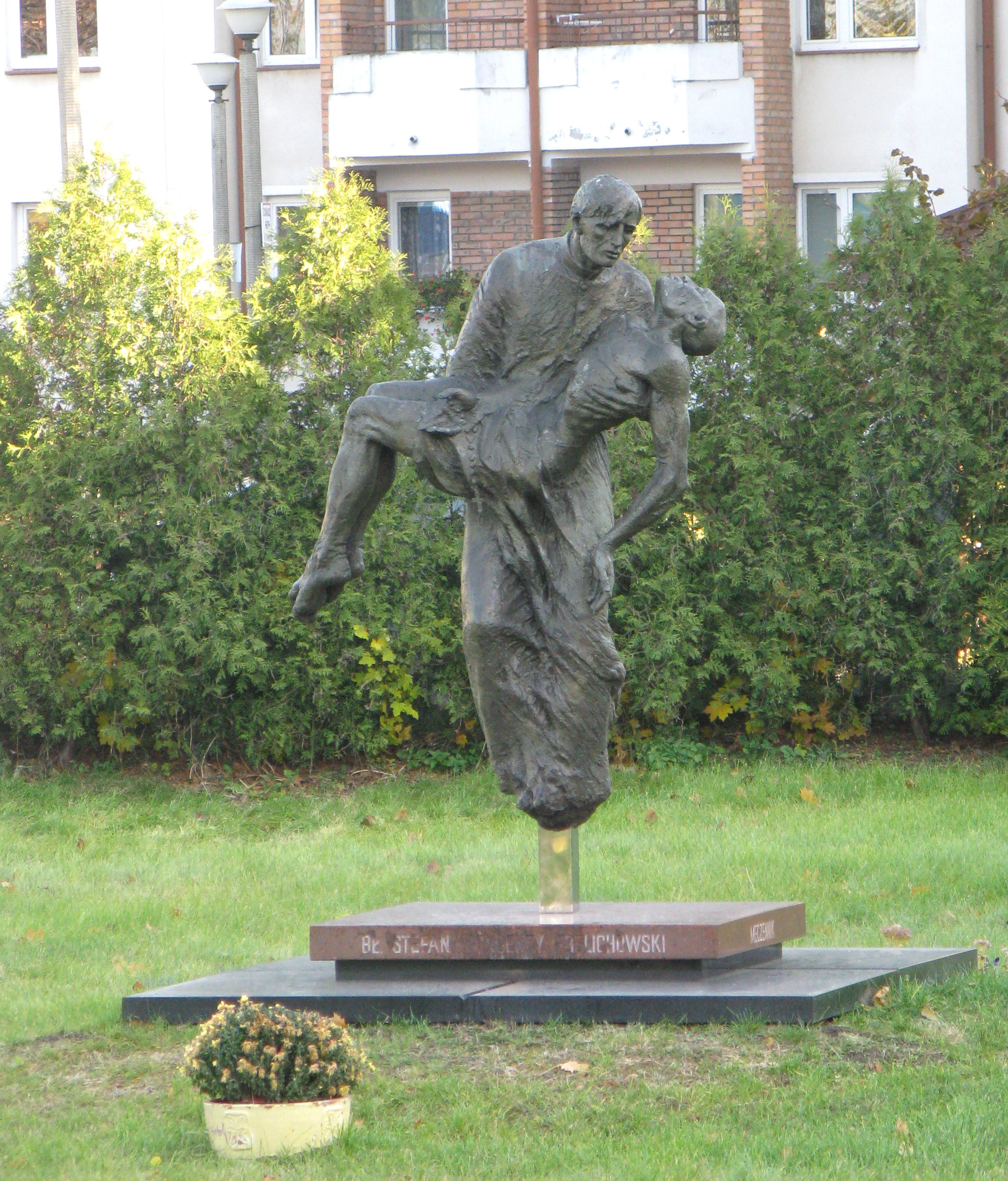 Pomnik Stefana Wincentego Frelichowskego w Toruniu